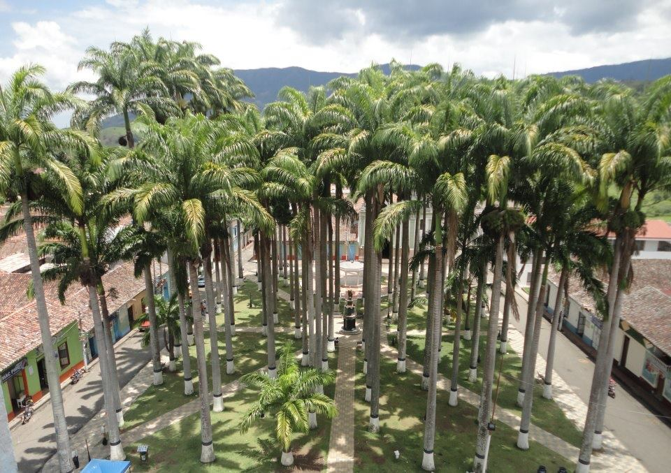 Templo San Pablo